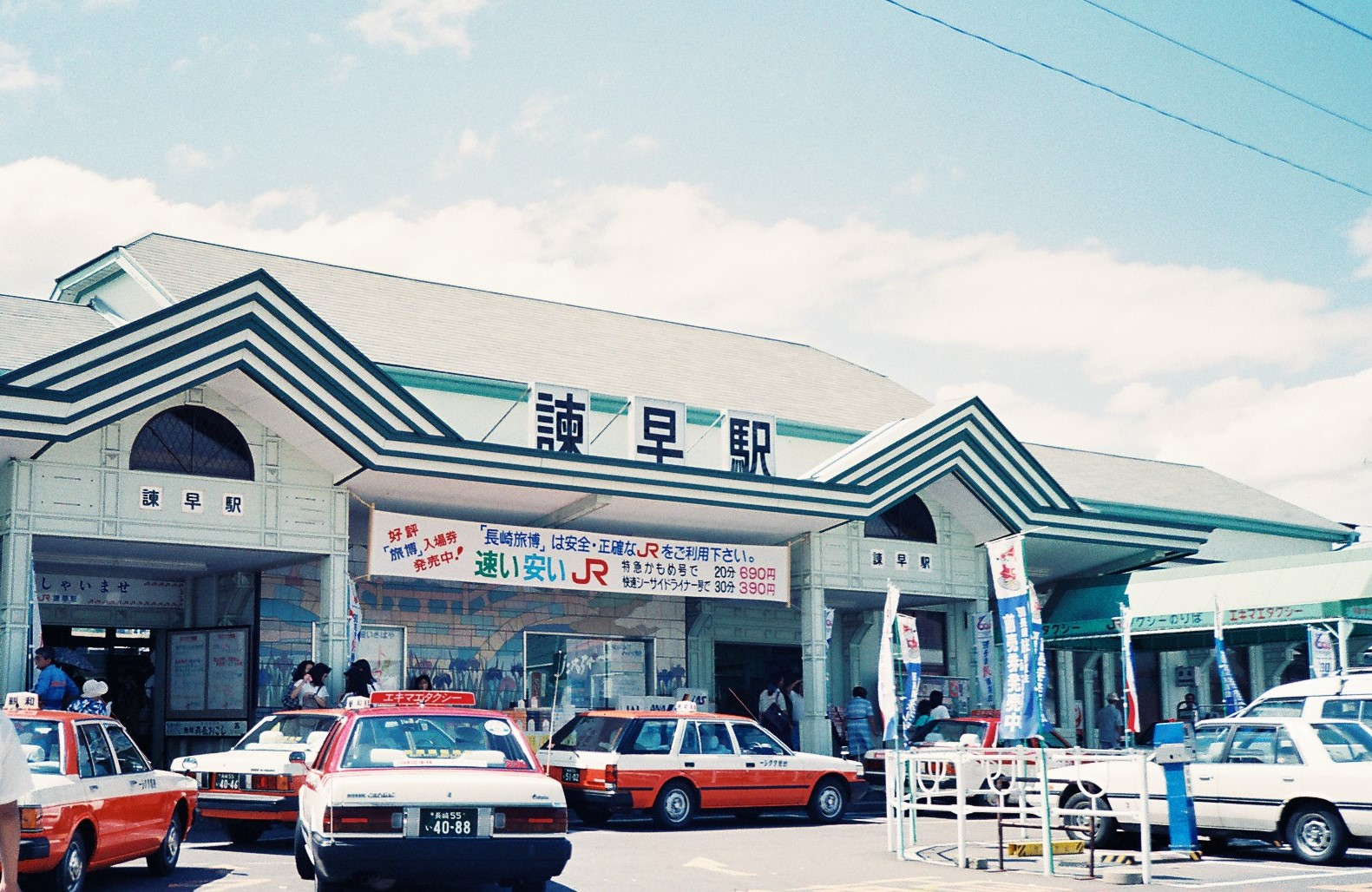 諫早駅駅舎（1990年8月撮影）